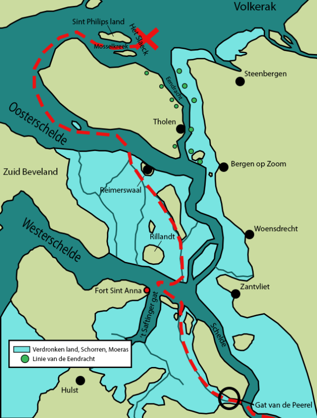 Route van de Spanjaarden in aanloop naar de slag op Het Slaak